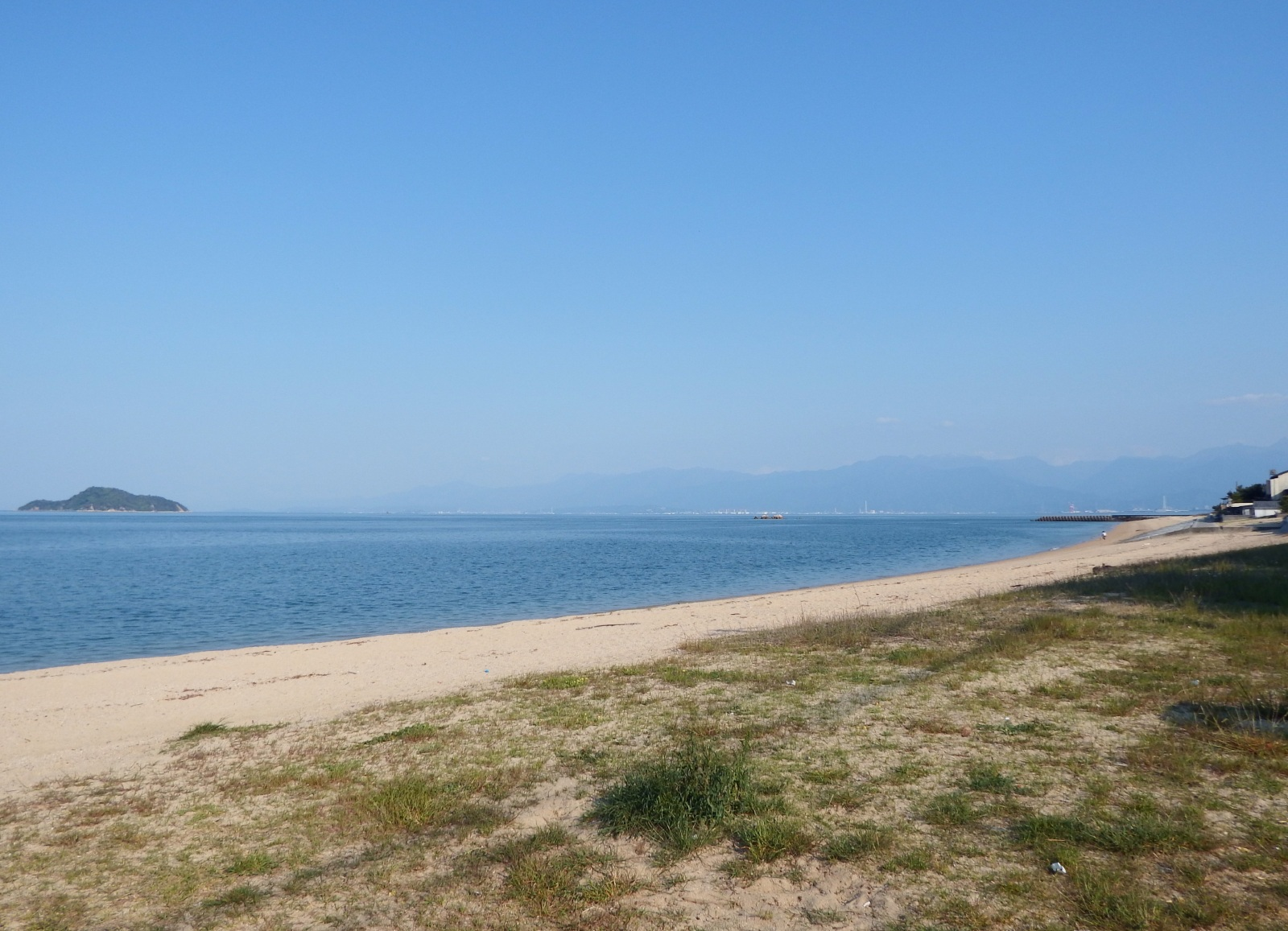 綱敷天満神社の東側の海岸